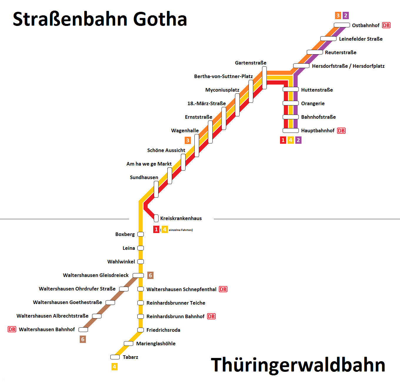 Liniennetzplan der Thüringerwaldbahn und Straßenbahn Gotha 1 Gotha Hauptbahnhof - Gotha Wagenhalle - Gotha Kreiskrankenhaus 2 Gotha Hauptbahnhof - Gotha Ostbahnhof 3 Gotha Wagenhalle - Gotha Ostbahnhof 4 Gotha Hauptbahnhof - Gotha Wagenhalle - Waltershausen Gleisdreieck - Rheinhardsbrunn - Tabarz 6 Waltershausen Gleisdreieck - Waltershausen Bahnhof Stand: 25. März 2014